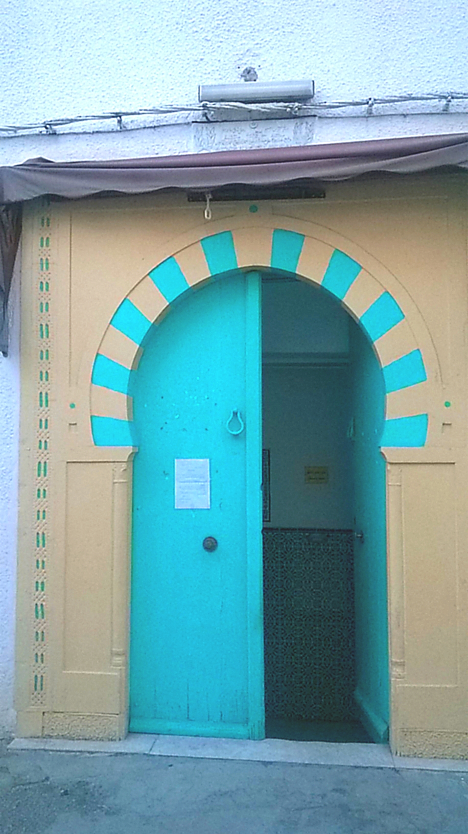 Sidi El Béchir , Tunis سيدي البشير ، تونس